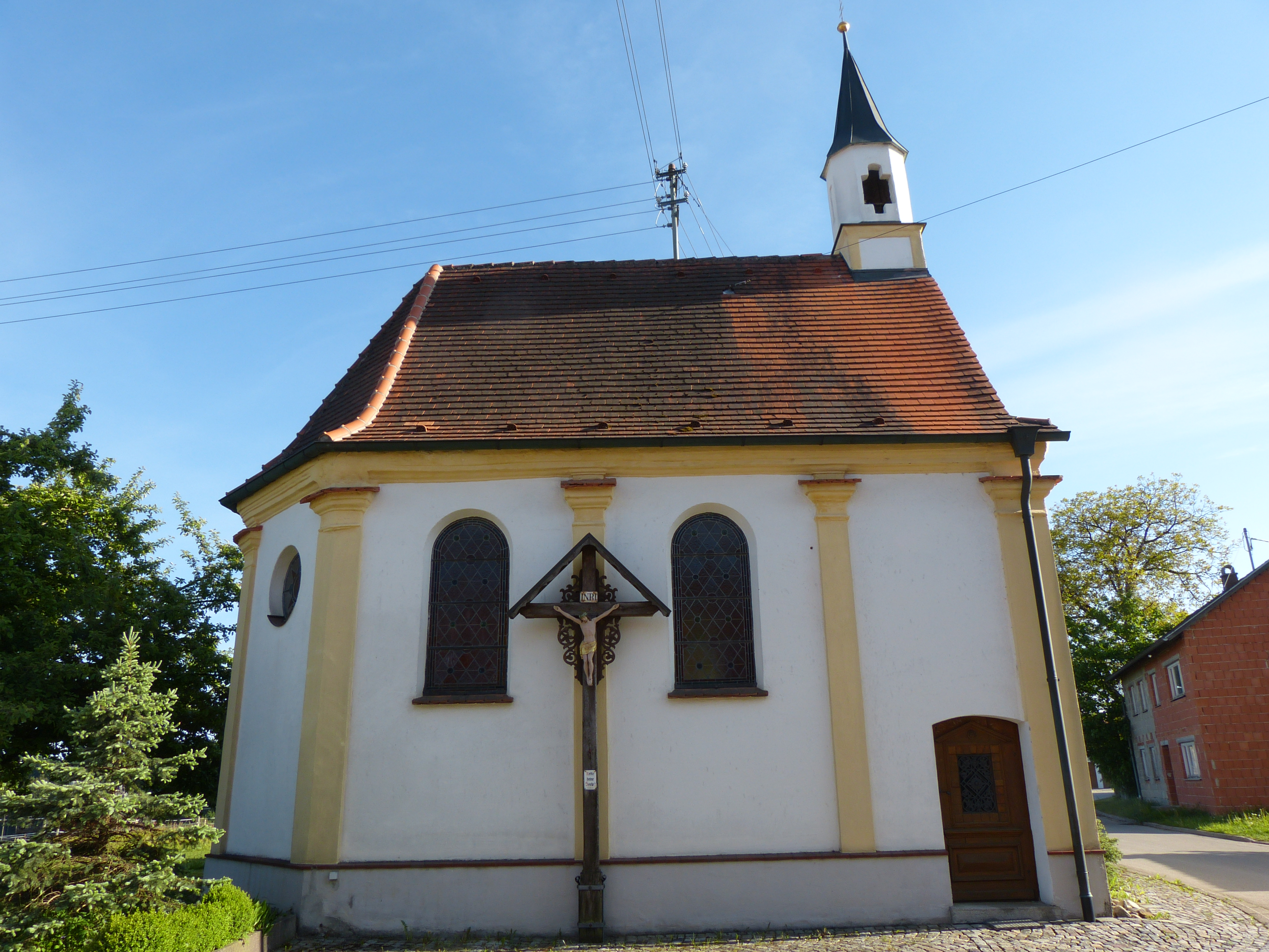 Pauli Bekehrung, Hohenreuten, Landkreis Unterallgäu, Bayern